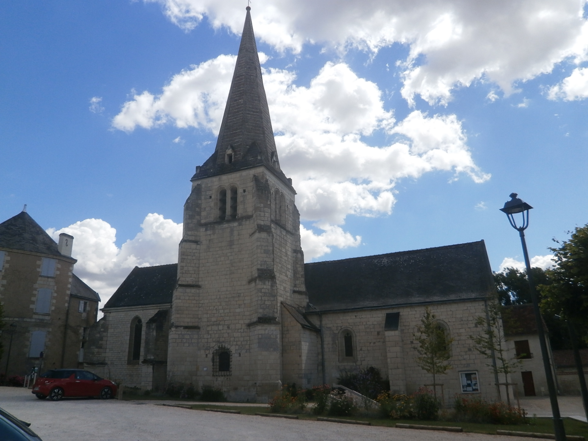 L'église de Jaulnay